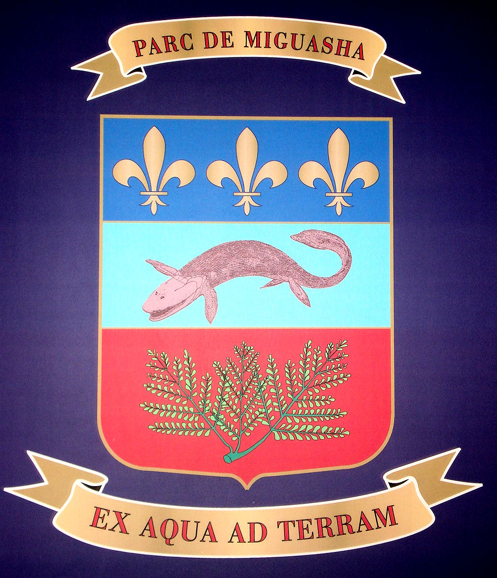 blason du parc de Miguasha (Gaspésie, Québec)